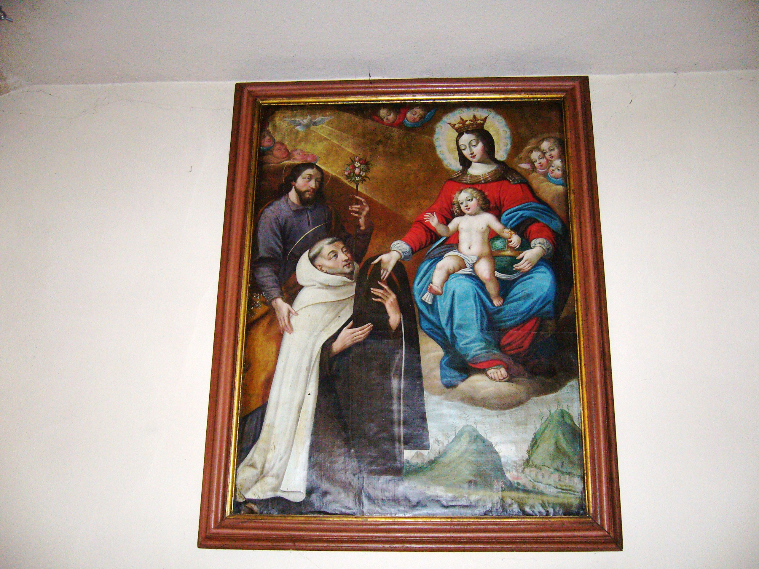 Remise du scapulaire à St Simon Stock, tableau baroque ( fin 17e - début 18e), MH classé